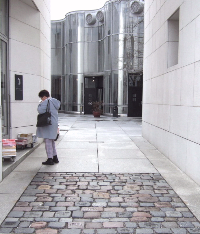 Tom Fecht: Kaltes Quadrat – Installation am Eingang zur Bundeskunsthalle in Bonn (2006) Material: Natursteine